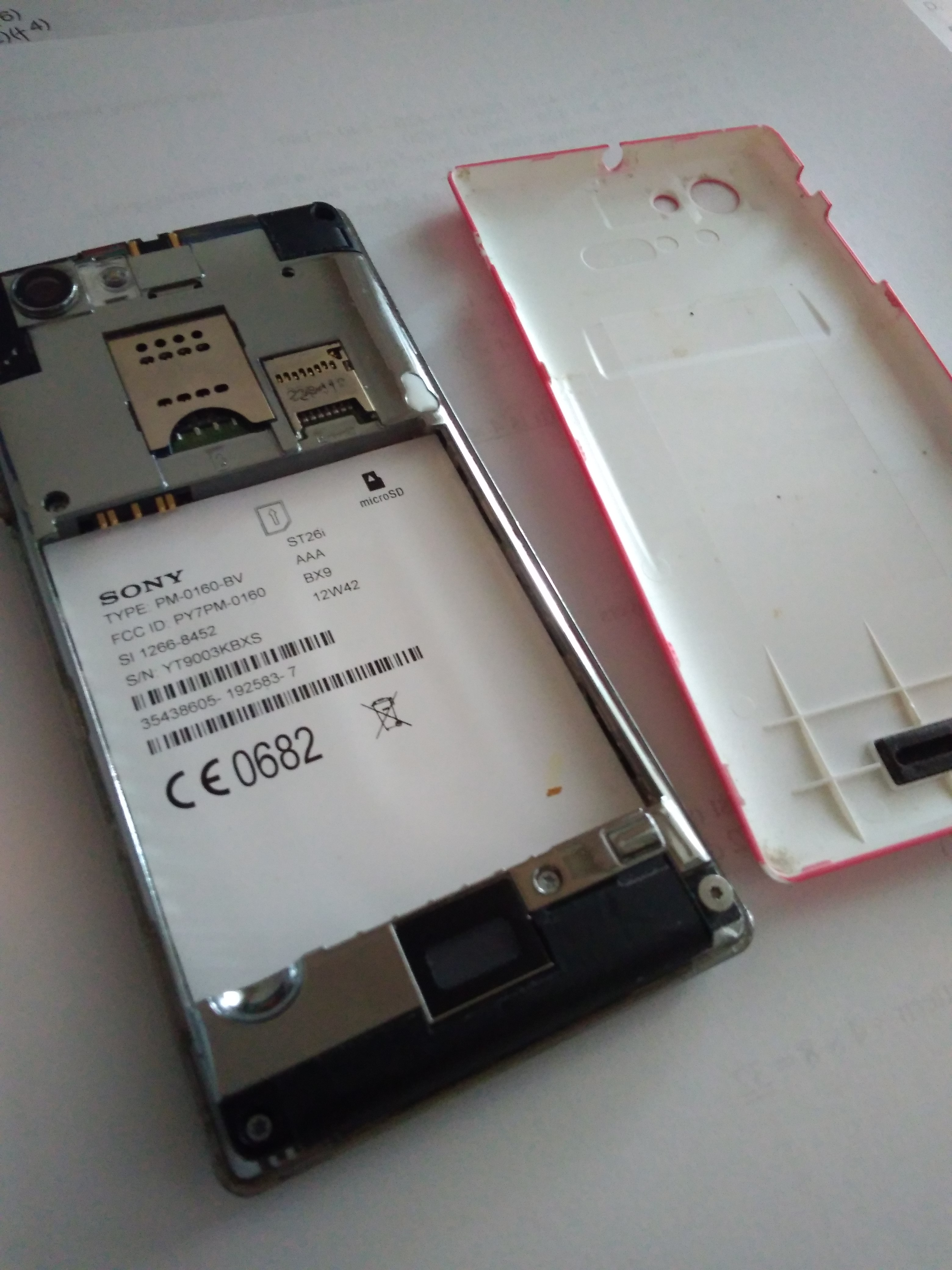 內部